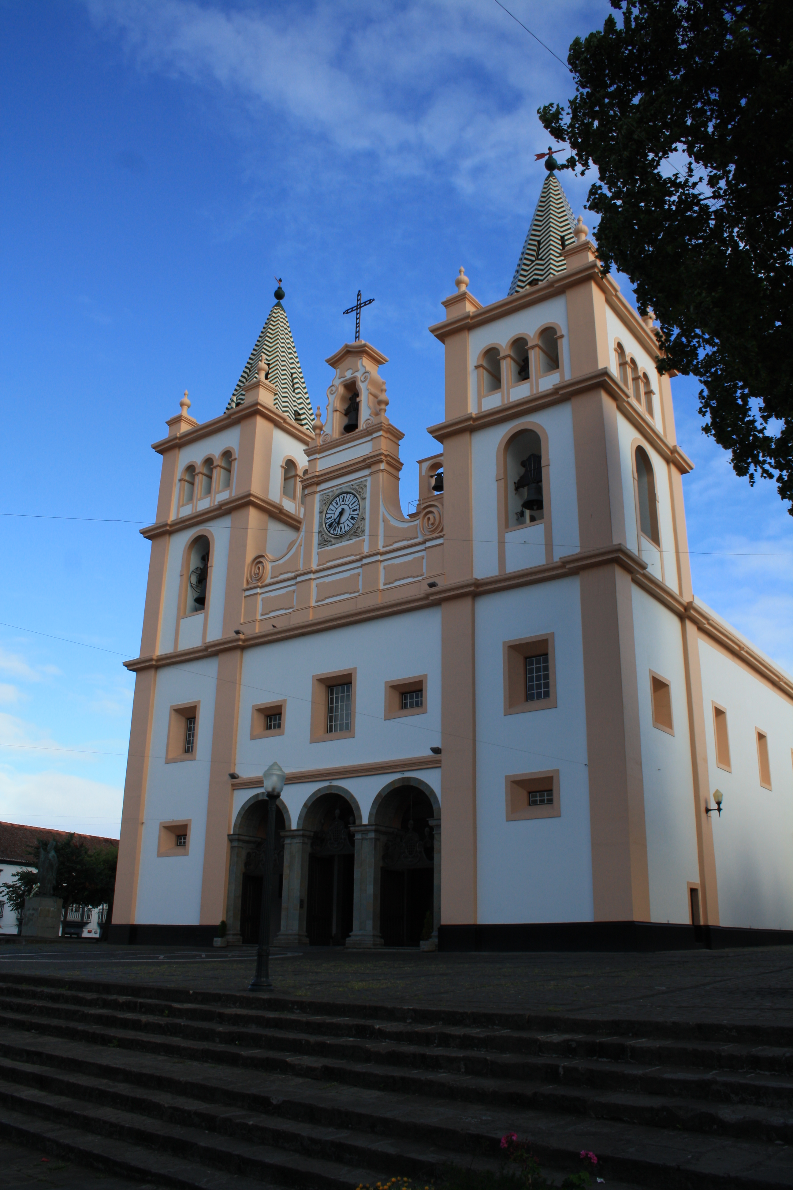 Igreja This file was uploaded for Wiki Loves Monuments in Portugal with the unique identifier 98180021.